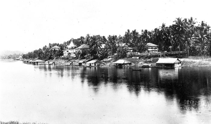 Foto. Gezicht vanaf de rivier Kapuas op Sanggau